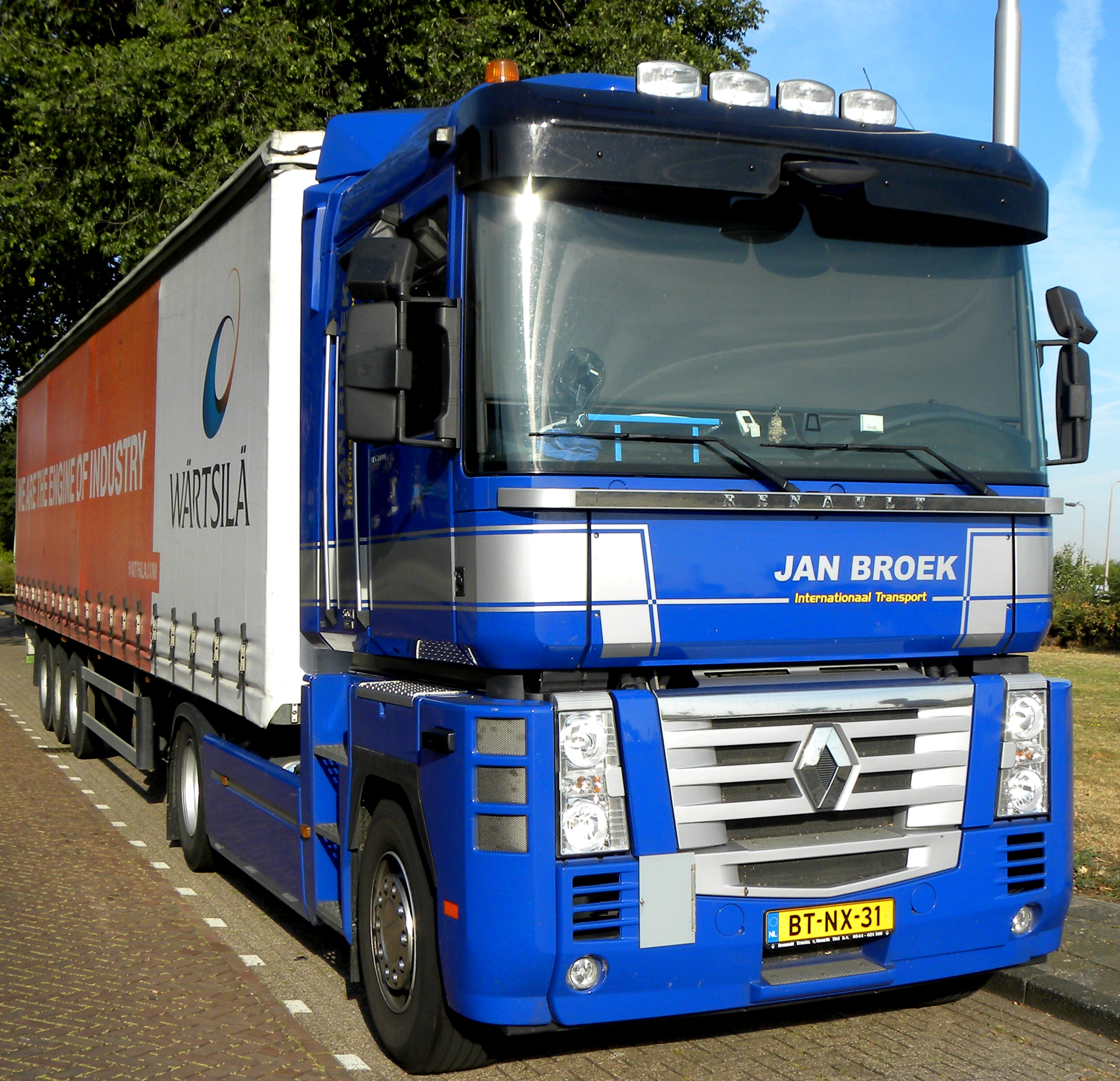 Renault Magnum 500-19 Jan Broek Internationaal Transport IJmuiden